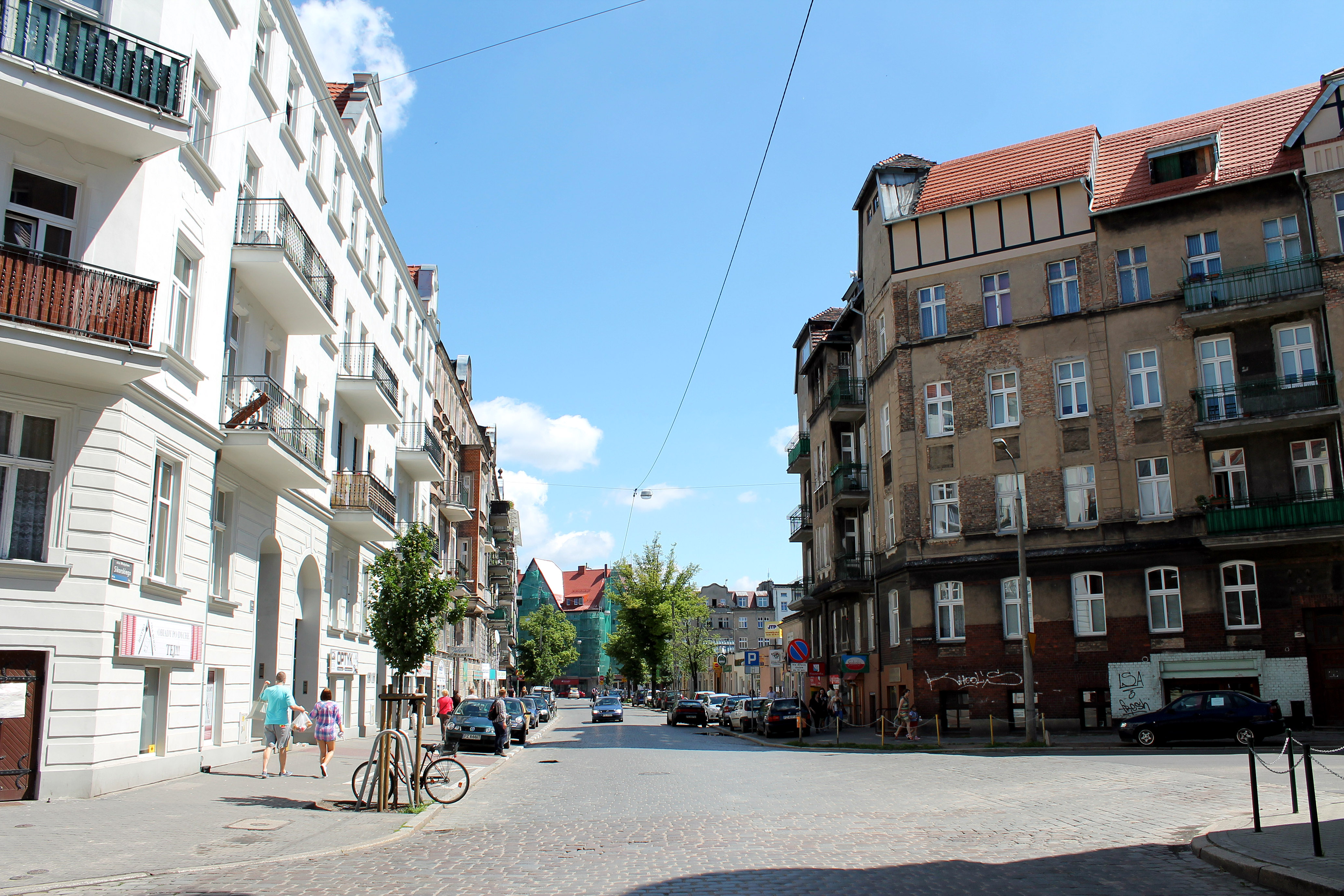 Skrzyżowanie ulic Sikorskiego i Prądzyńskiego, Poznań.